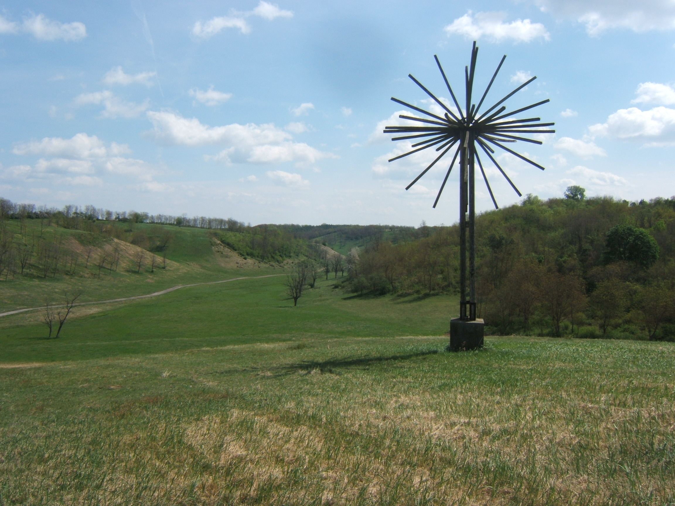 Felsőnána, Tolna megye középpontja